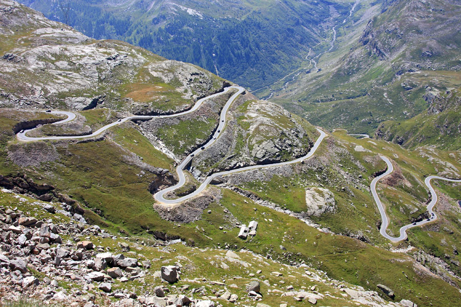 Gli ultimi tornati della strada che sale al colle del Nivolet